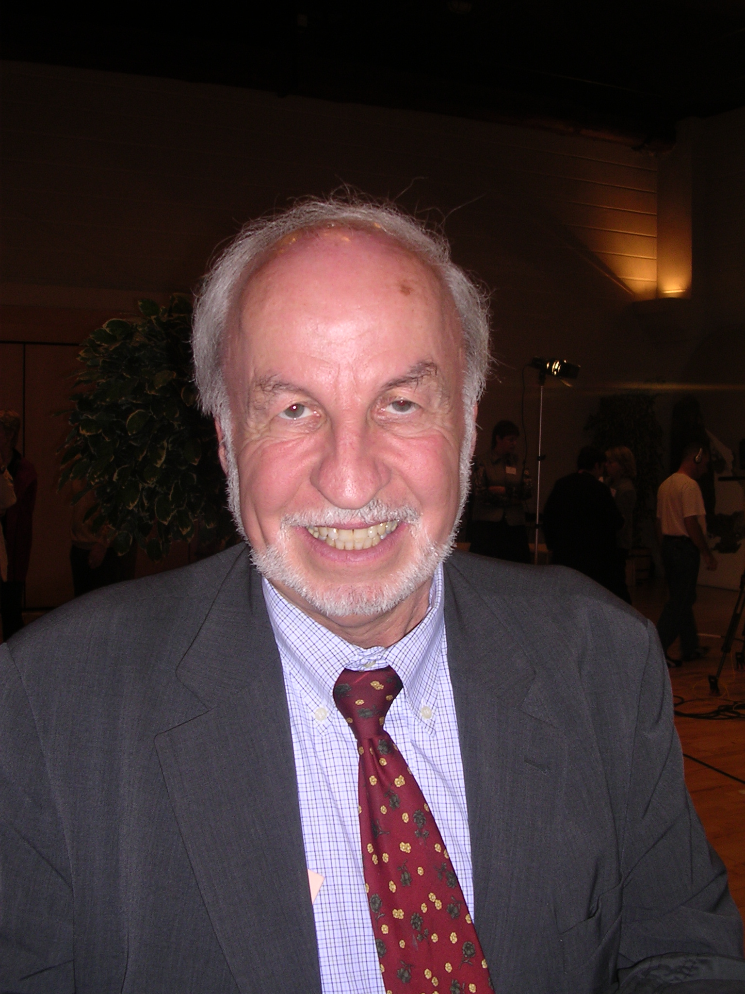 Louis Besson (1935-), ancien député français, ministre de 1989 à 1991 et de 1997 à 2000, maire de Chambéry, photographié lors des élections sénatoriales de 2004.